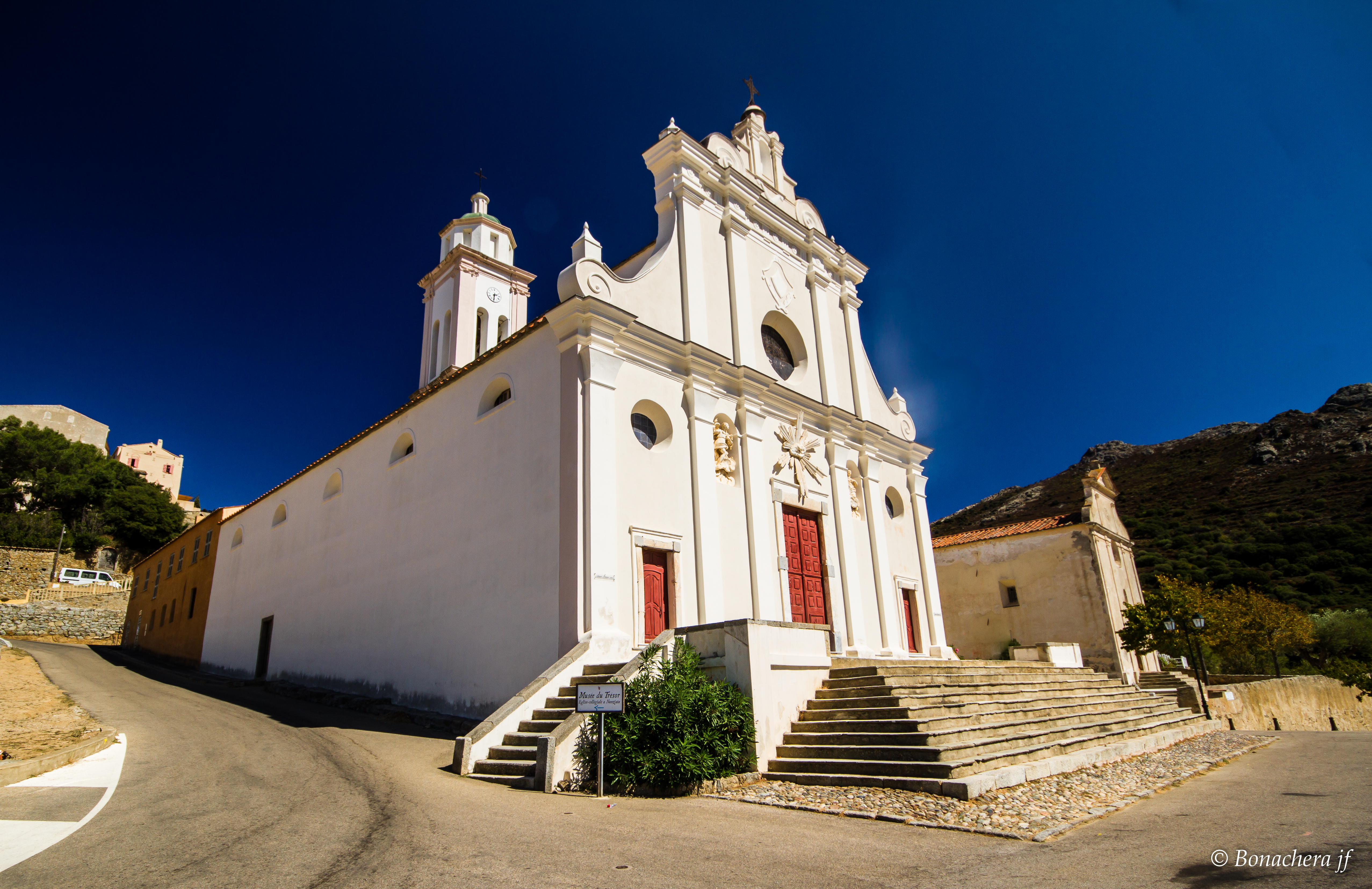 Corbara, Balagne (Corse) - Église-collégiale A Nunziata